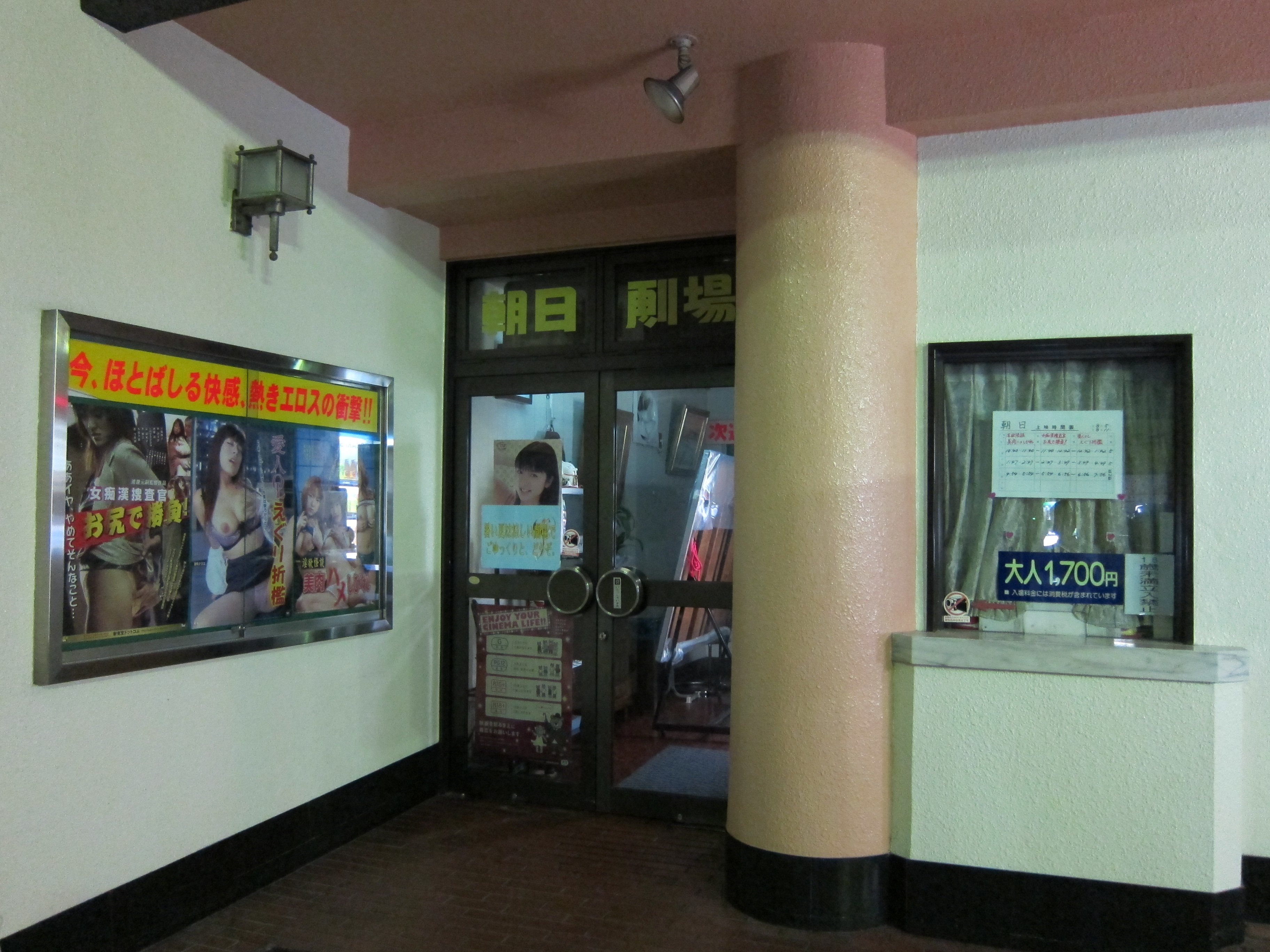 岐阜県岐阜市 柳ケ瀬通7丁目7 成人映画館 朝日劇場